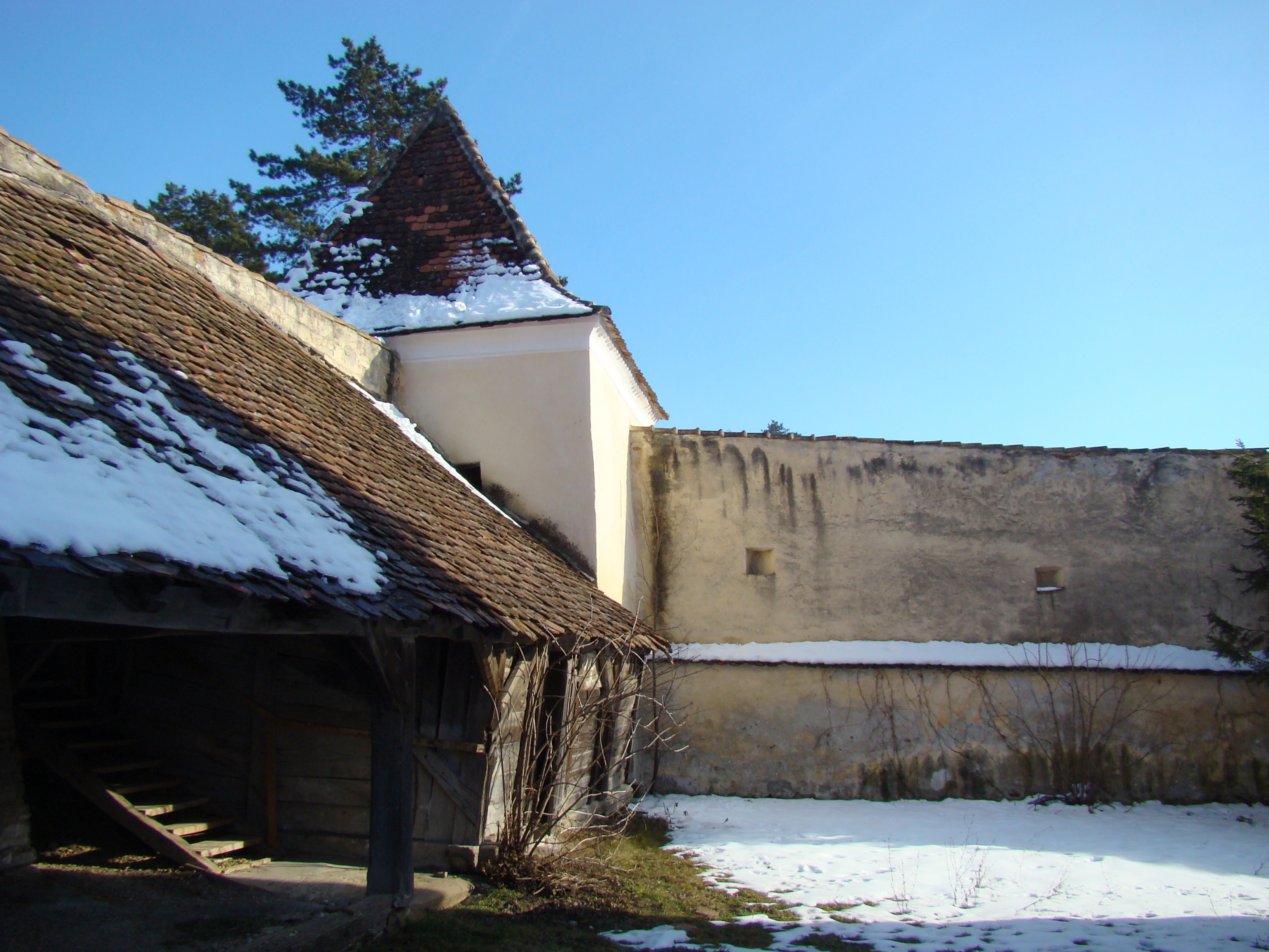 Incinta fortificată cu turnurile și bastionul, sat Zagăr; comuna Zagăr, județul Mureș 02